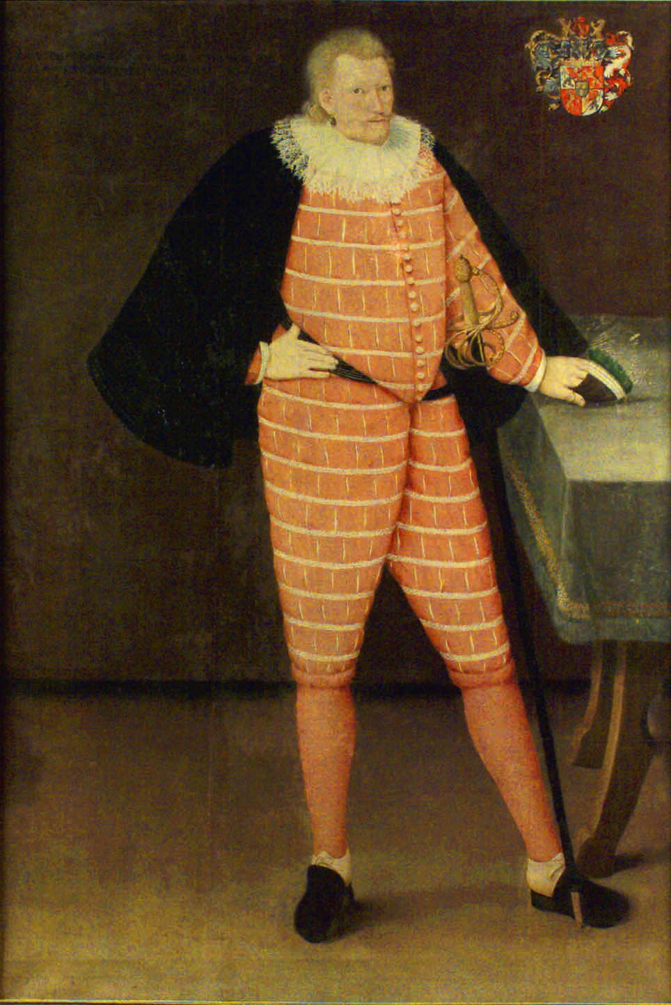 Maurits Lewenhaupt (1559–1607)